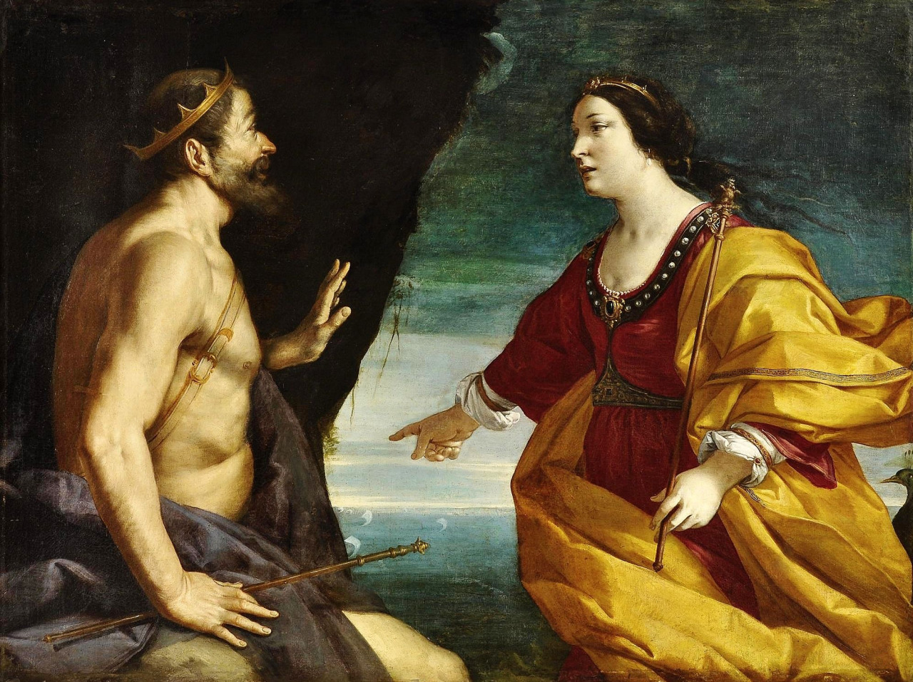 ? × ? cm